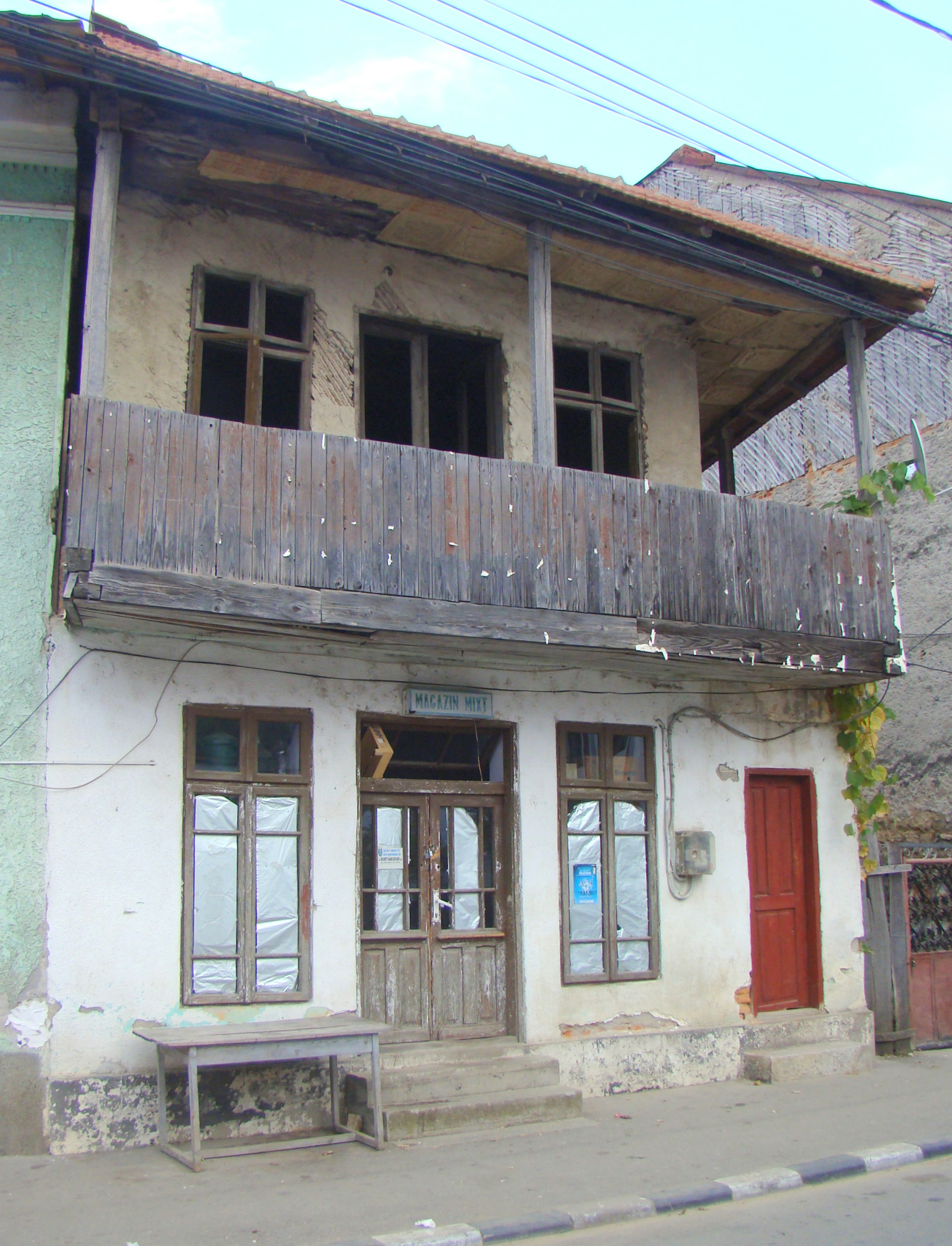 Casă, oraș Baia de Aramă, str. Republicii 5 1901